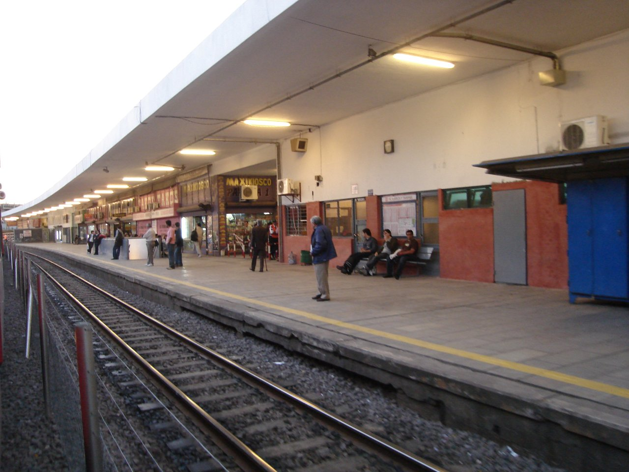 Edificio principal sobre el andén número 1 de la estación Boulogne Sur Mer del Ferrocarril General Belgrano. Boulogne Sur Mer, partido de San Isidro, provincia de Buenos Aires, República Argentina.